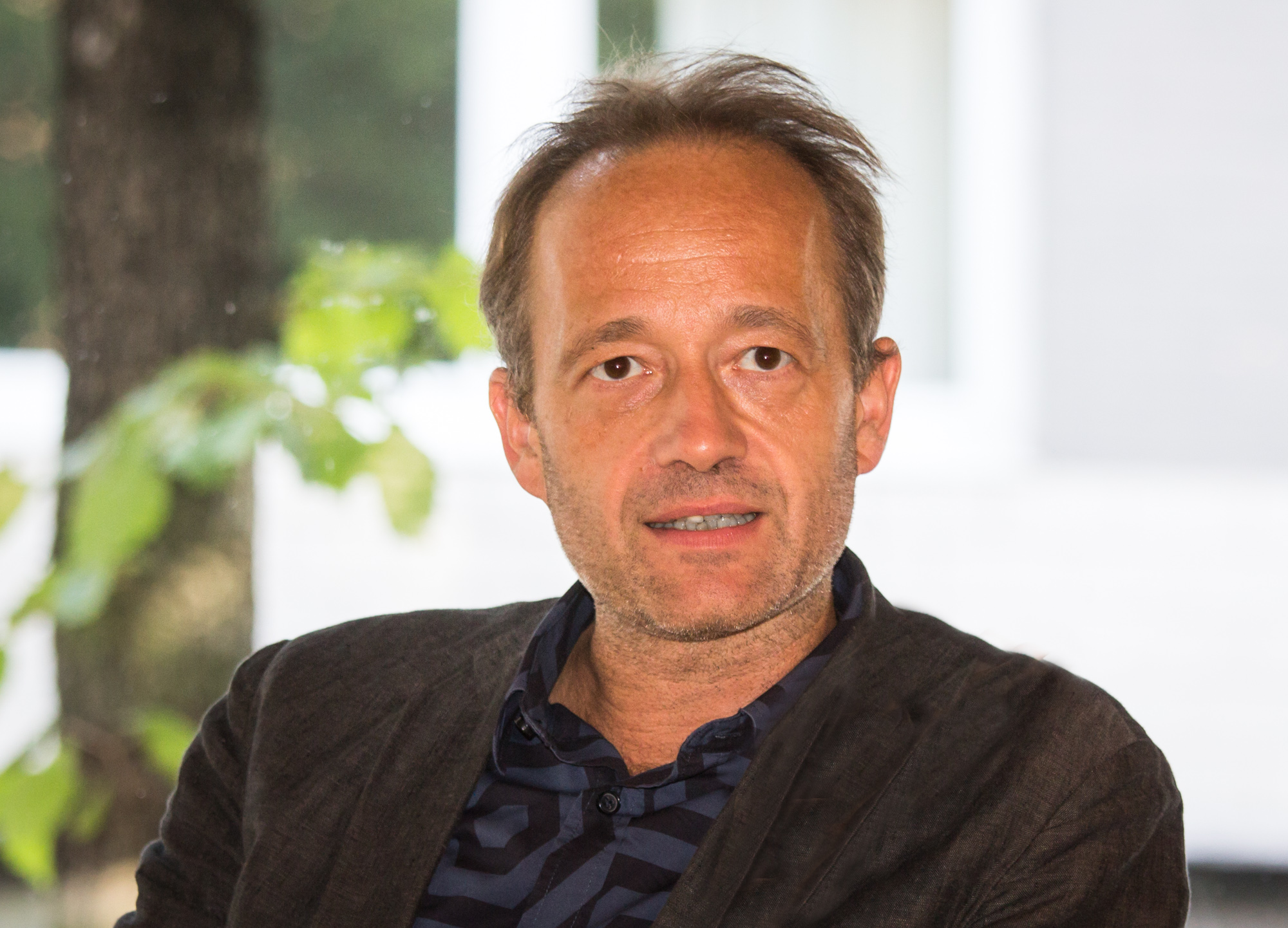 Stephan Weidner 2017 in Köln, Buchvorstellung Hamid Sulaimans "Freedom Hospital"